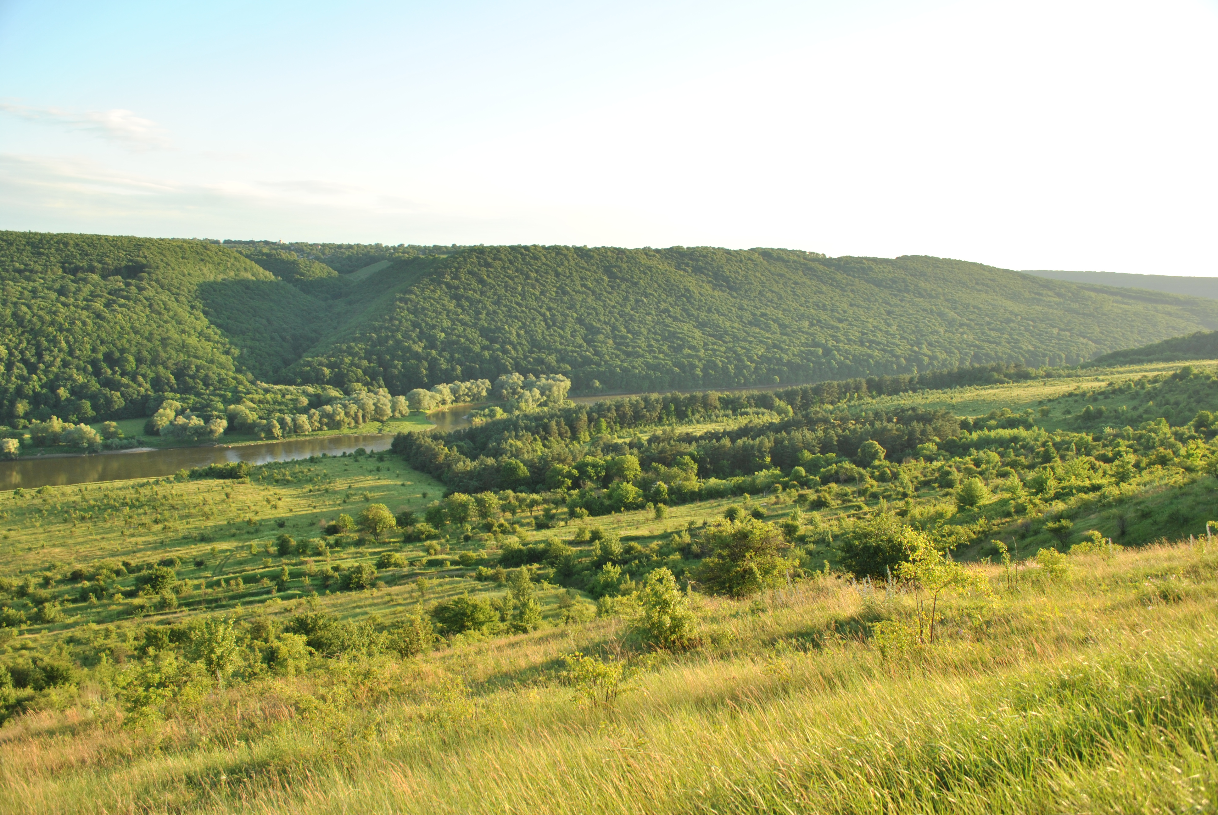 «Дністровський каньйон» біля с. Губин Бучацького району Тернопільської області.